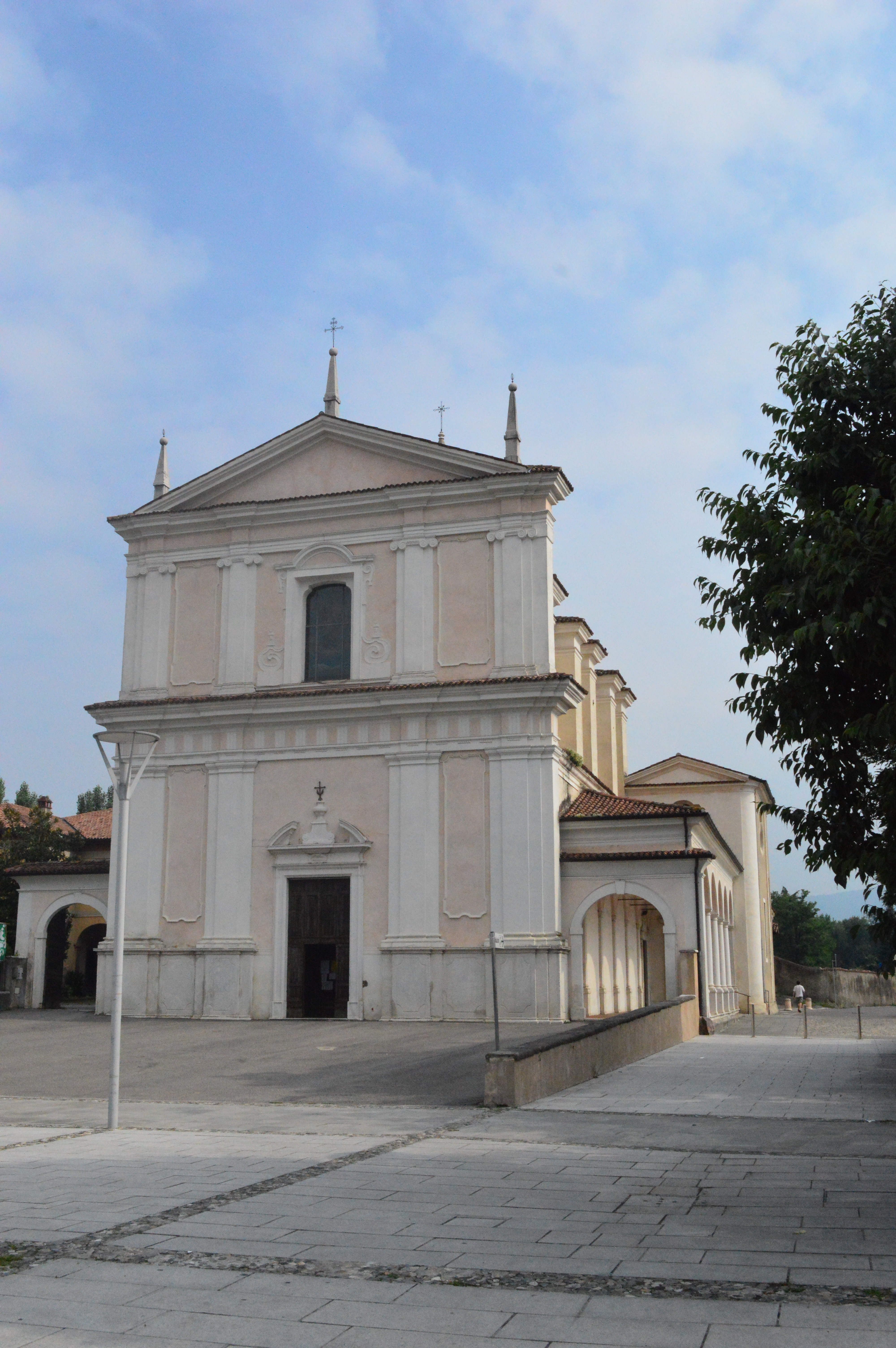 chiesa di San Zenone - Passirano (BS)